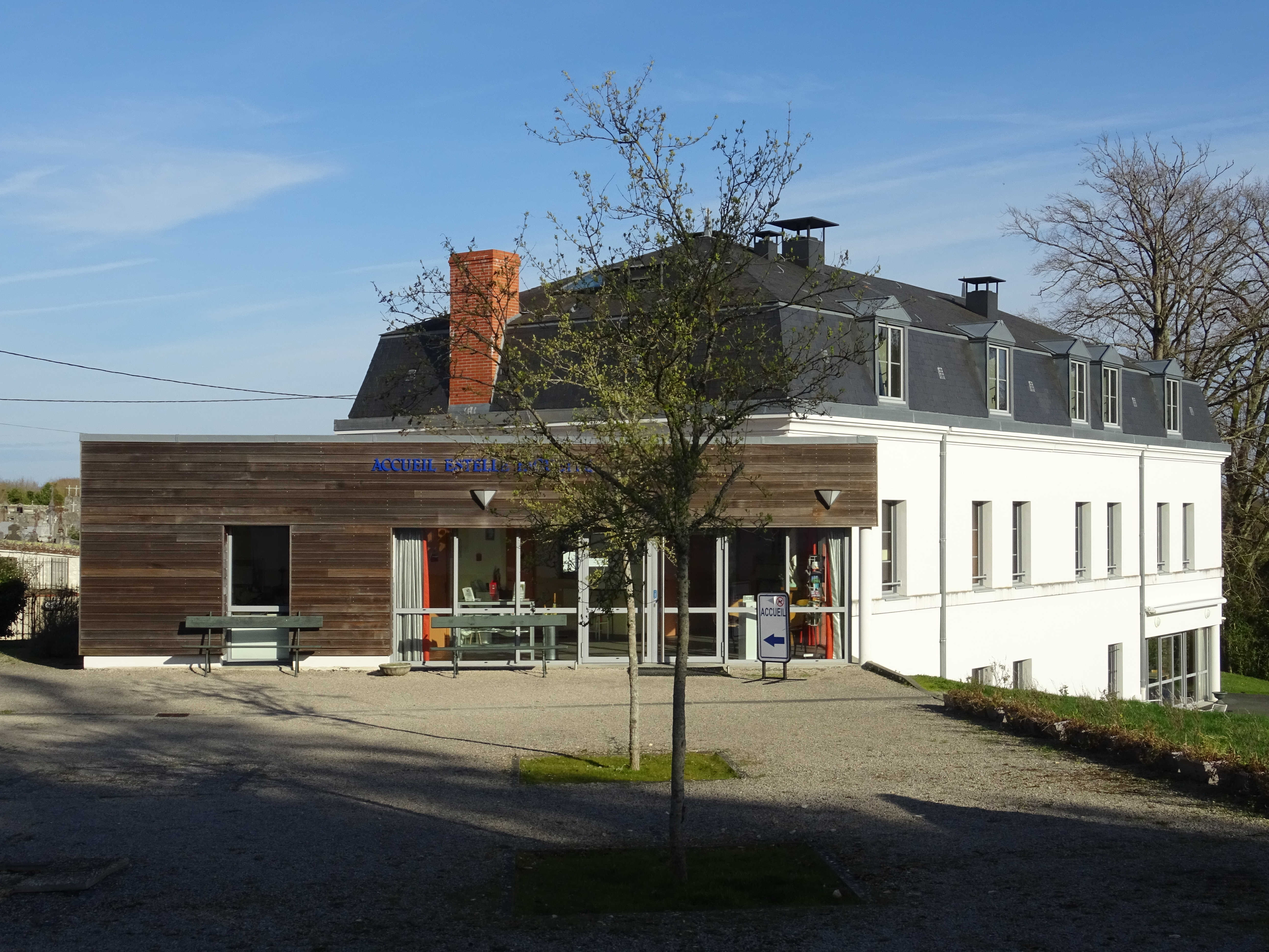 L'accueil du centre Estelle Faguette et le bâtiment de trois niveaux comprenant la salle de conférence, avec les chambres sous combles et le réfectoire et les cuisines de plein pied avec le parc. - Inauguré en 2009